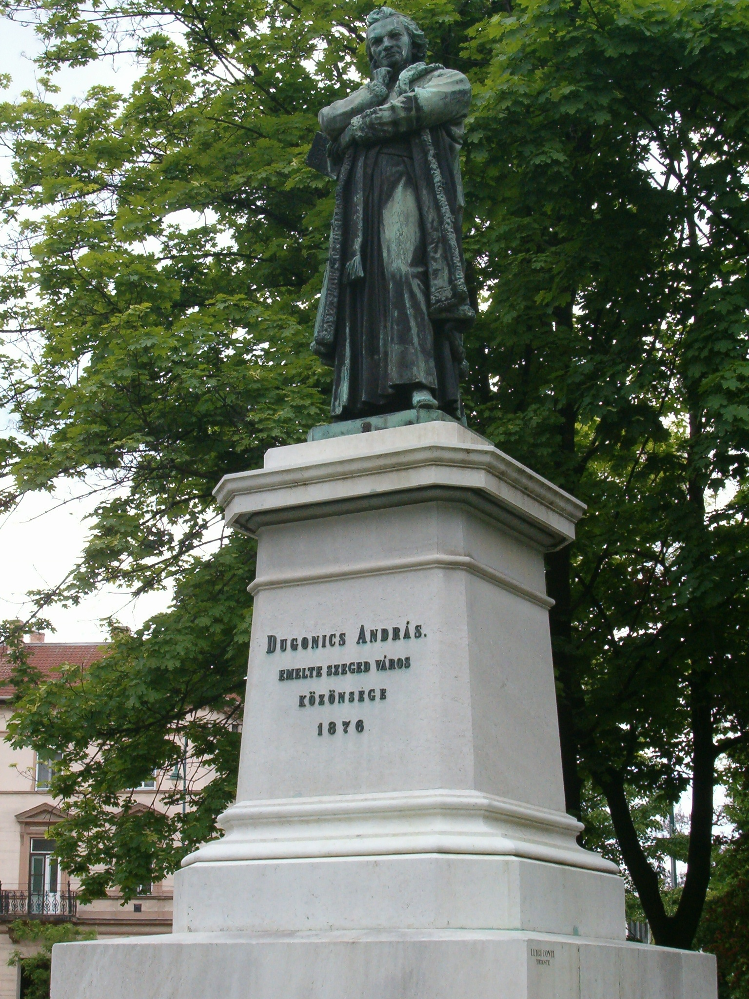 statue of Dugonics András, author of the first Hungarian novel in Szeged, Hungary -- Dugonics András Izsó Miklós, 1876 (halála miatt Huszár Adolf fejezte be) -9246